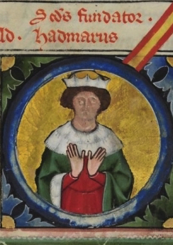 Hadmar II Kuering